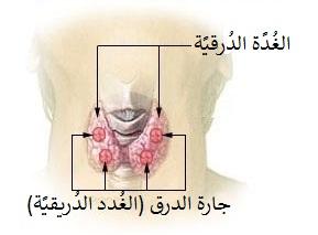 جارة الدُرق أو الغُدد الدُريقيَّة إلى جانب الغُدَّة الدُرقيَّة.